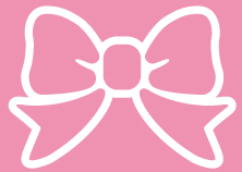 福岡市のカワイイ区のロゴマーク